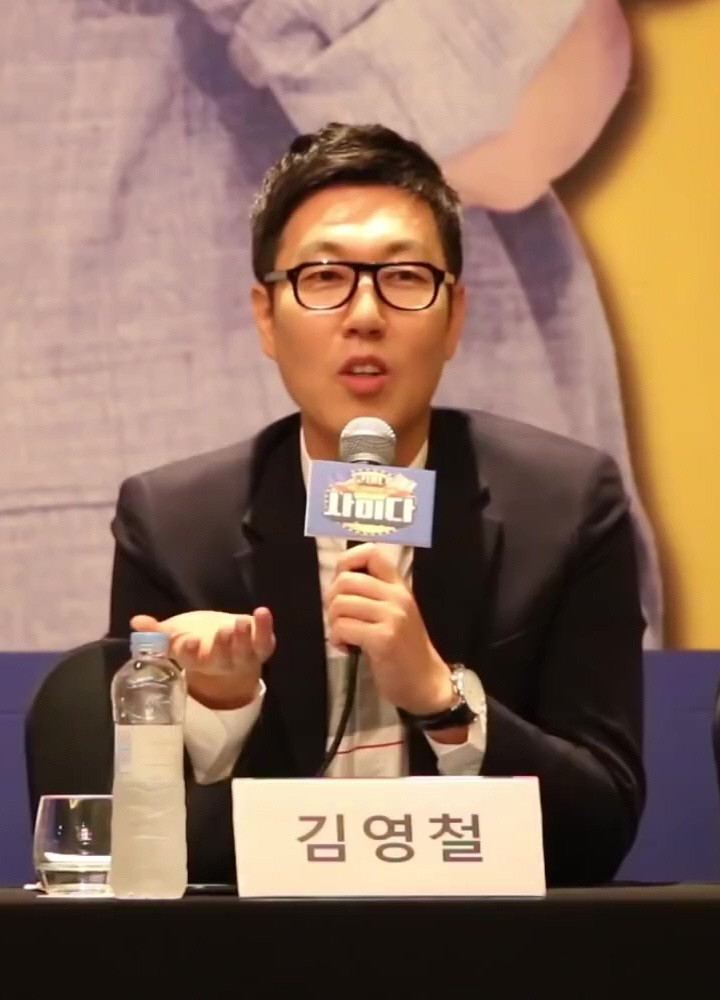 (TV10) 사이다 김영철=이영자는 자웅동체